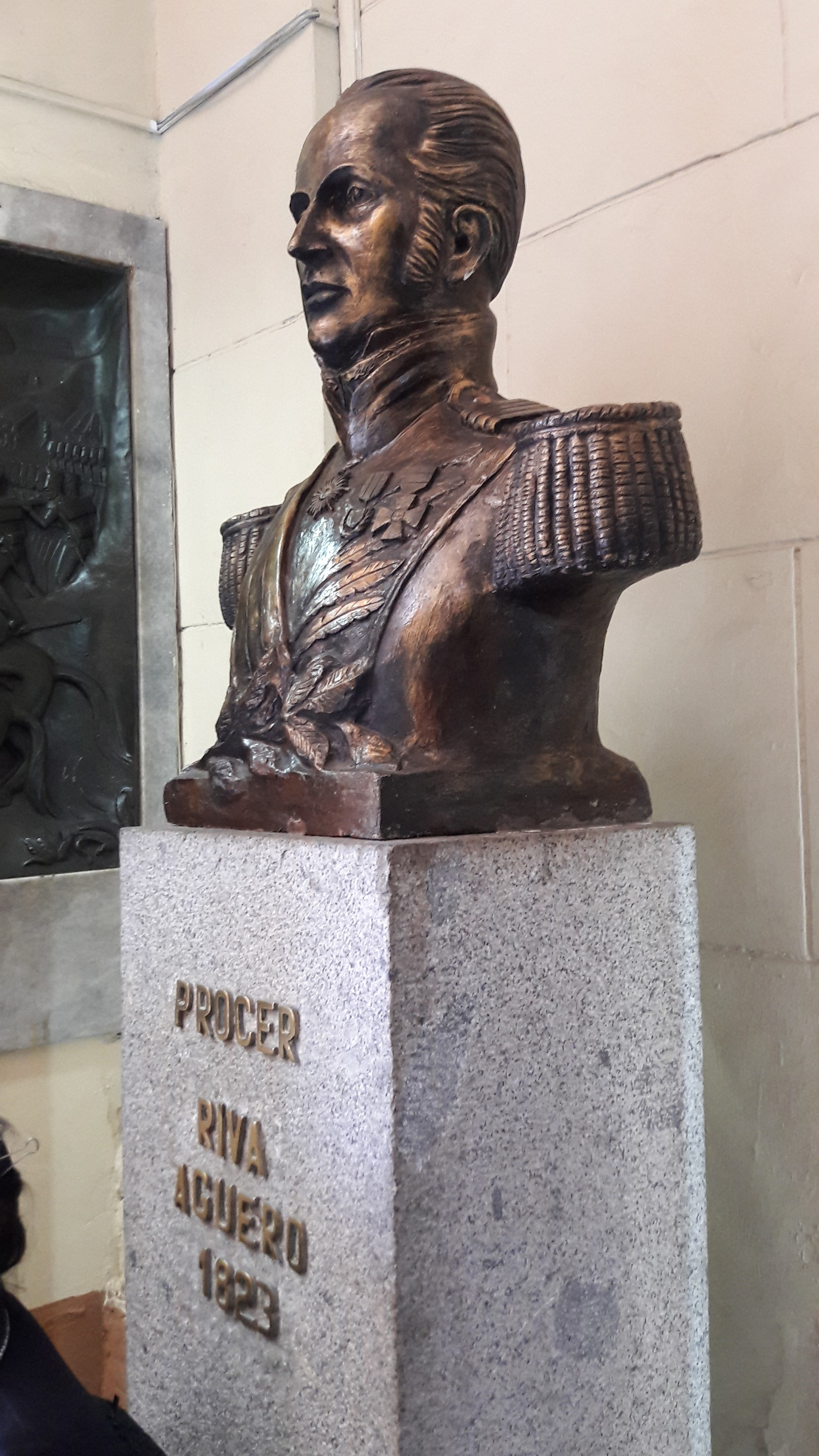 Prócer Riva Aguero 1823